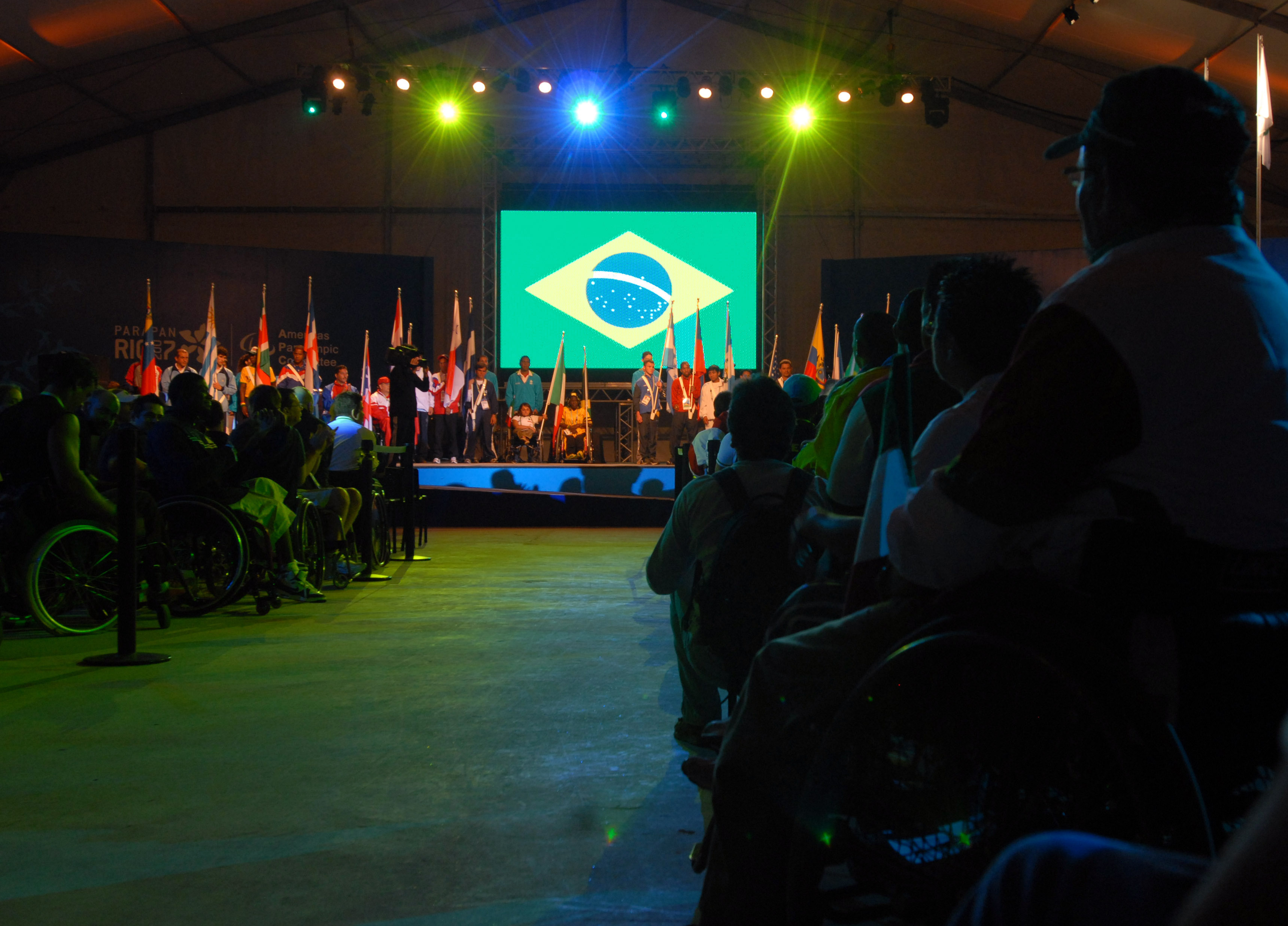 Rio de Janeiro - Cerimônia de encerramento dos Jogos Parapan-Americanos Rio 2007, na Vila Parapan-Americana, em momento de confraternização para os 1.300 atletas e oficiais das 25 delegações participantes